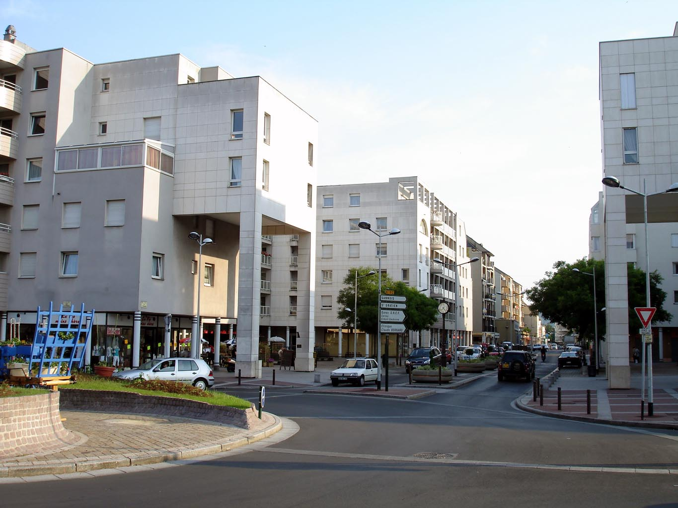 La place Robert-Bichet et la rue de Stalingrad à Ermont (Val-d'Oise), France